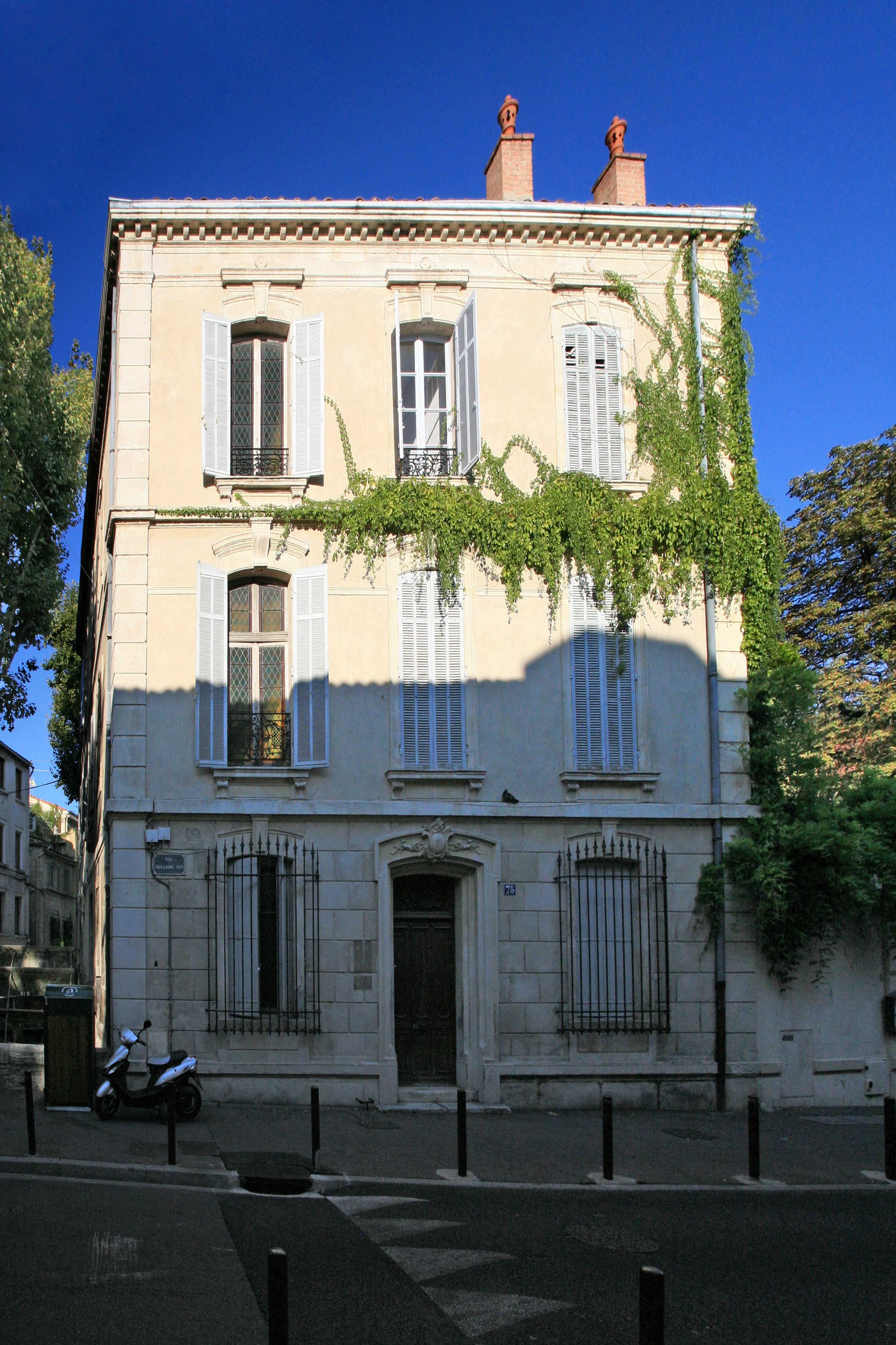 Maison de Jules Pernod, Avignon, Vaucluse, France.